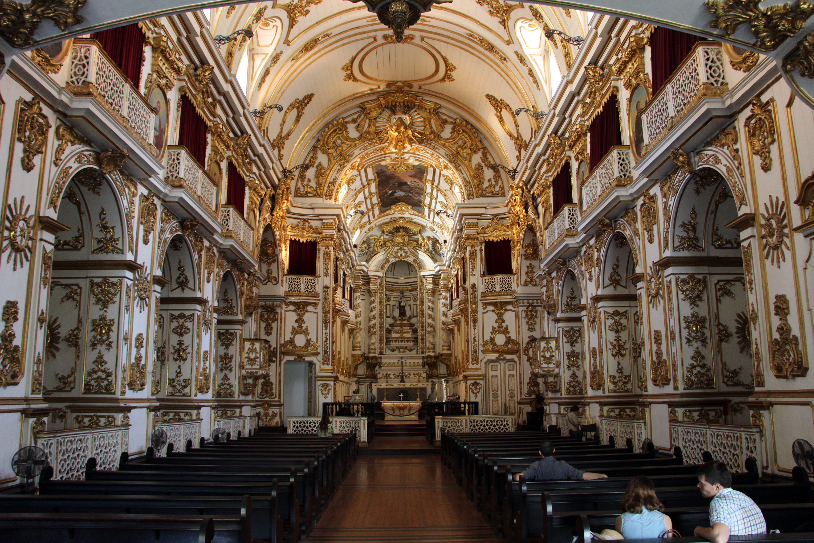 chiese di Rio de Janeiro